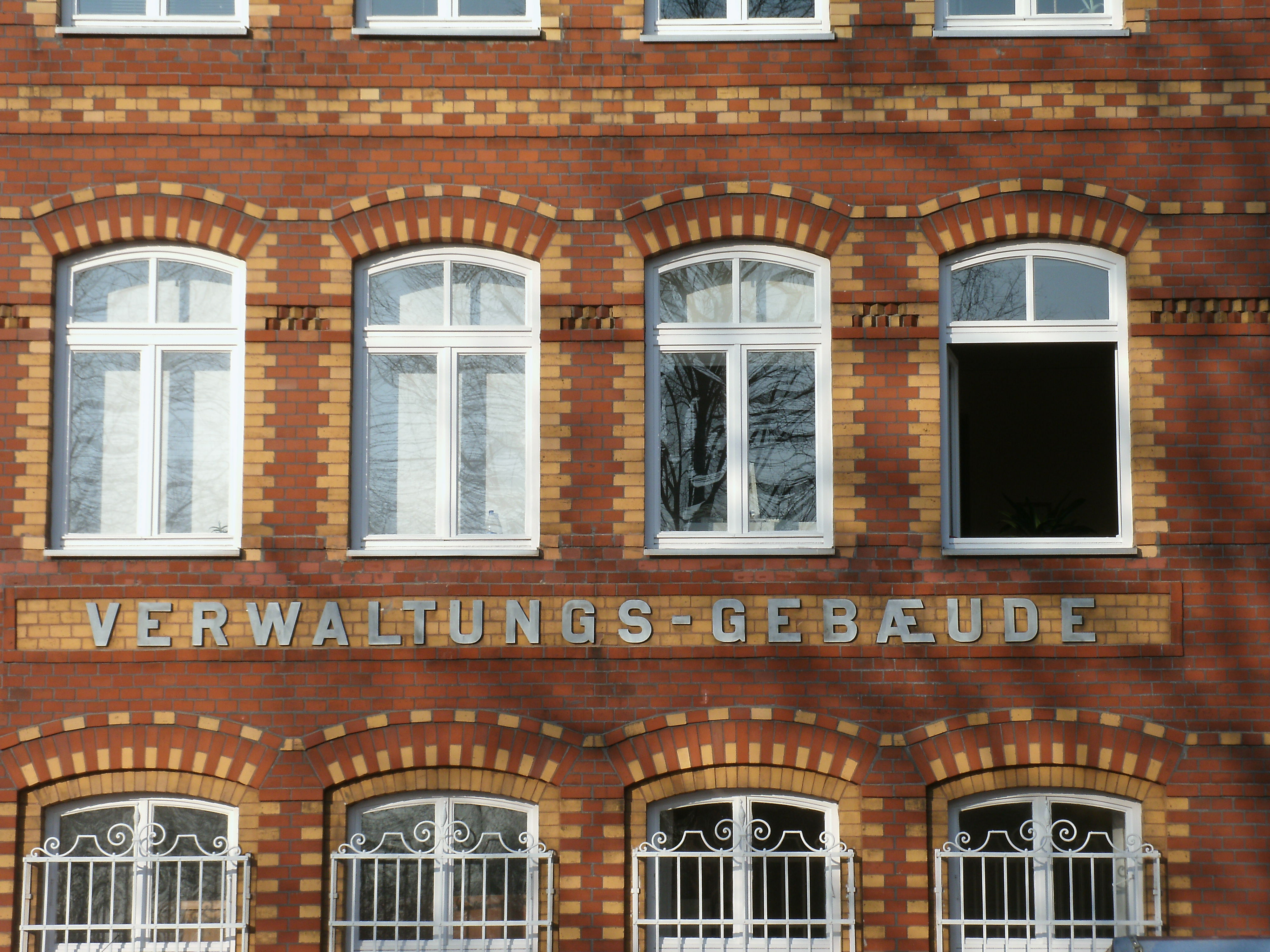 Augsburg, Proviantbachstraße 1, Ehem. Städtischer Schlacht- und Viehhof, Verwaltungsgebäude (Schriftzug)